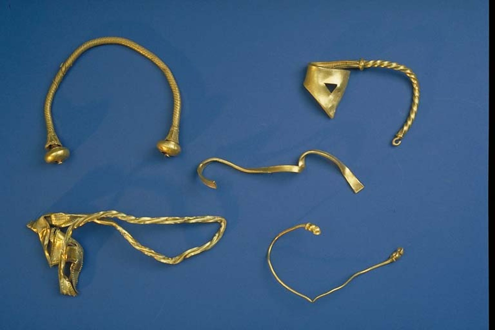 De fem guldföremålen i Vitteneskatten, funna 1995, i Vittene, Trollhättans kommun. Skatten väger 1,9 kilo, och förvaras i Guldrummet på Statens Historiska Museum.